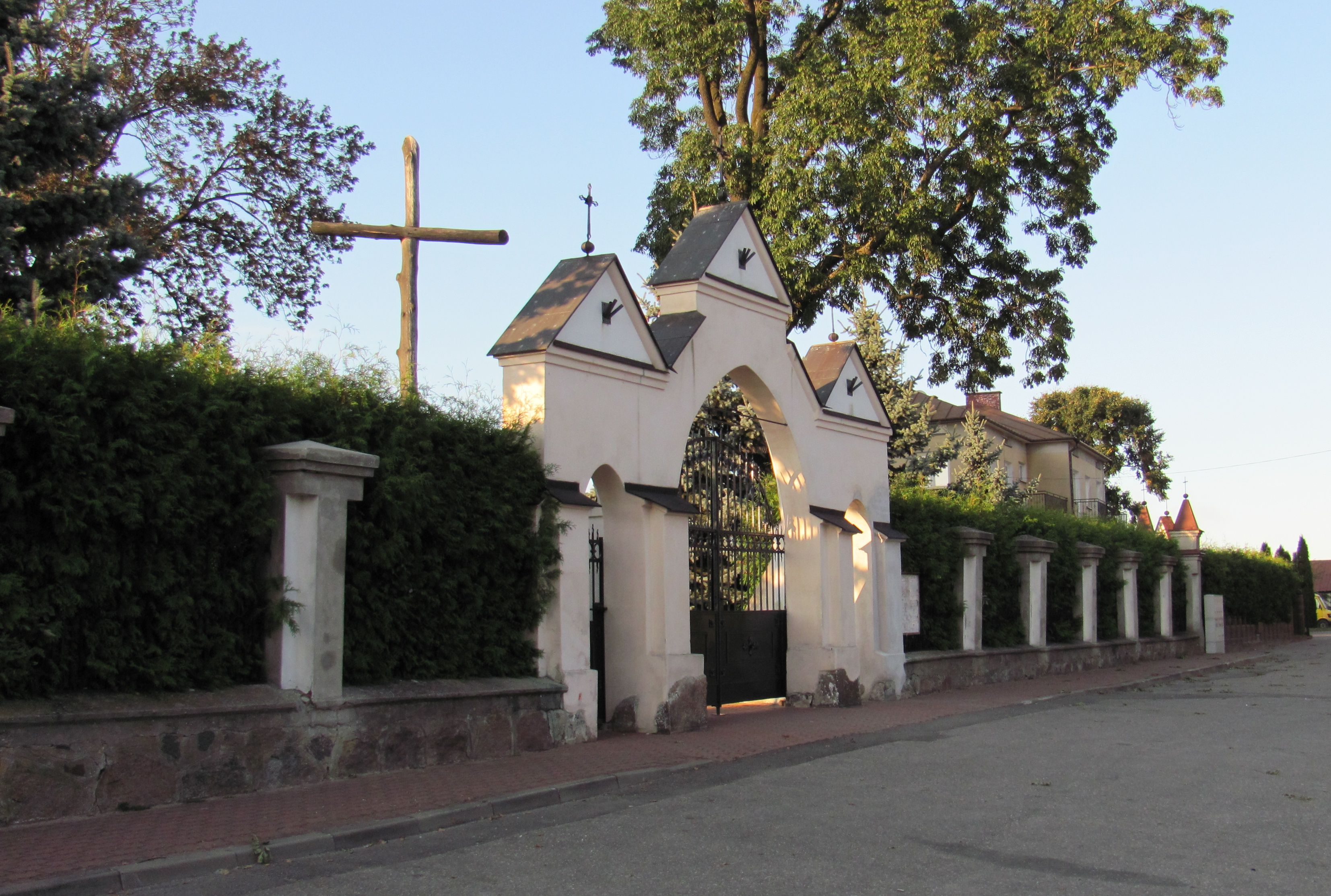 Wysokie Mazowieckie - ogrodzenie z bramą przy kościele p.w. św. Jana Chrzciciela